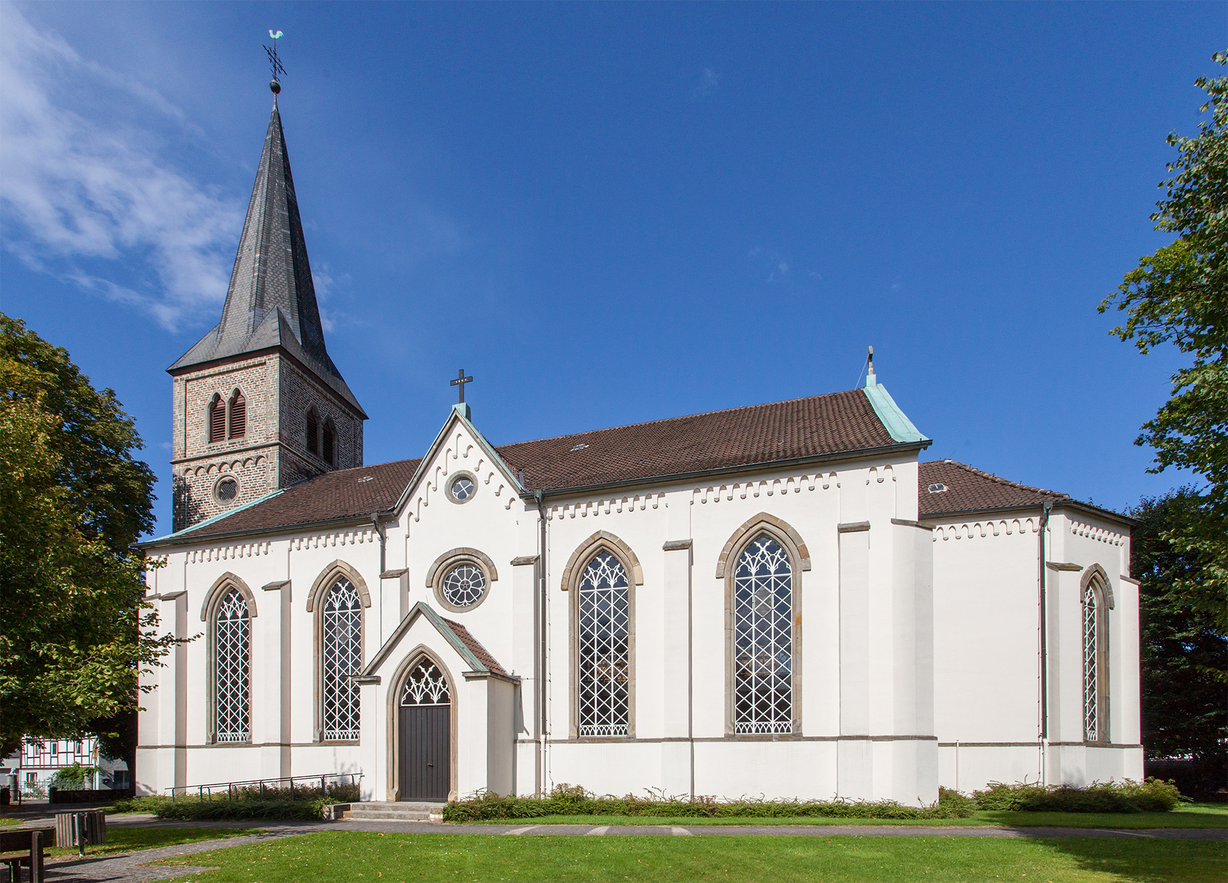 Evangelische Kirche Bega (Dörentrup)This is a photograph of an architectural monument.